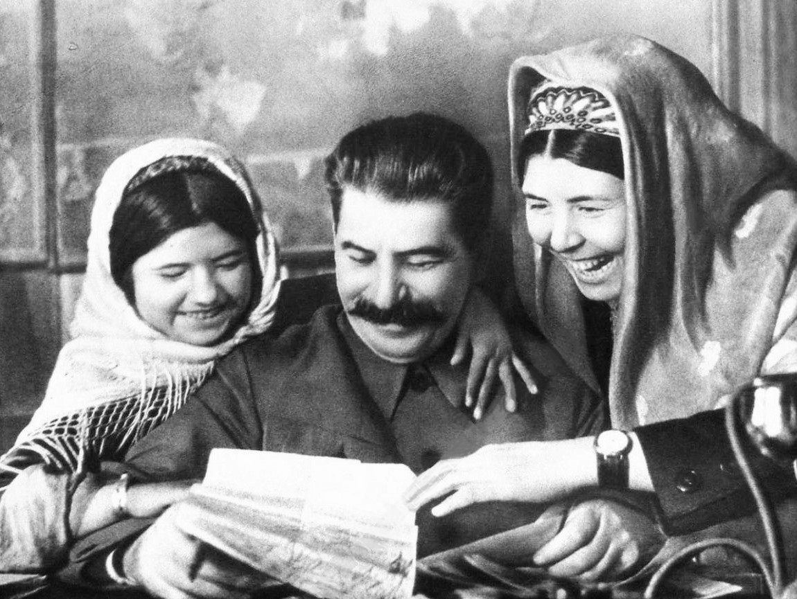 И.В. Сталин даёт автограф участнице совещания передовиков хлопковых полей одиннадцатилетней пионерке из колхоза Сталинабадского района Таджикской ССР Мамлакат Наханговой (слева), отличившейся на уборке хлопка. Справа стоит председатель Фарабского райисполкома Туркменской ССР и член ЦИК Туркменской ССР Эне Гельдыева. Данный снимок не следует путать с похожей фотографией, сделанной в это же время Фёдором Кисловым. На снимке Калашникова взгляд Наханговой следит за рукой Сталина. На снимке Кислова девушка смотрит в объектив фотографа